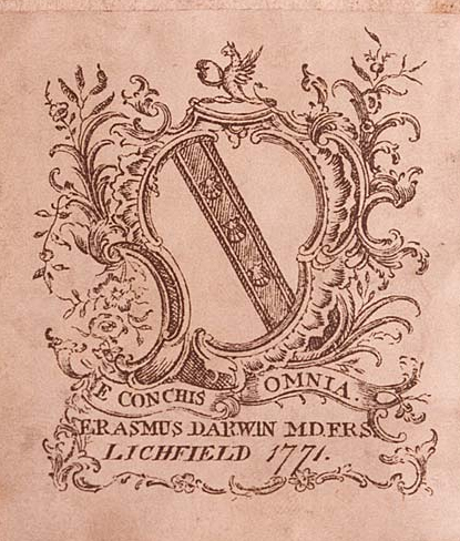 Brasão de Erasmus Darwin